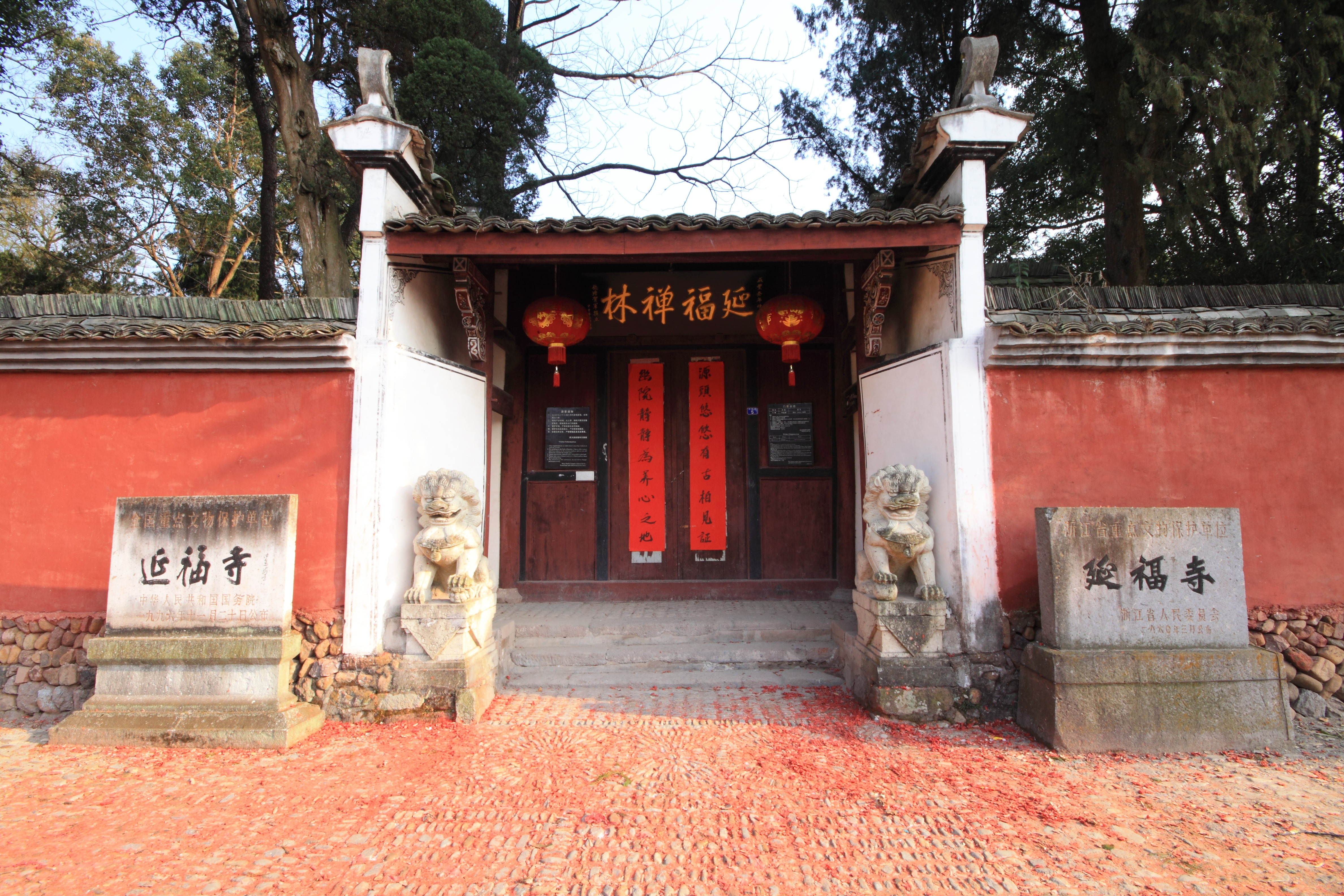 延福寺，位于中国浙江省武义县，是全国重点文物保护单位。